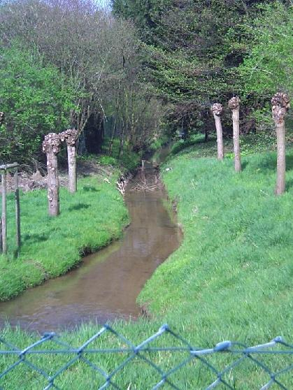 Der Verlauf der Köhm im Erkelenzer Ortsteil Borschemich neben dem Pfarrhaus